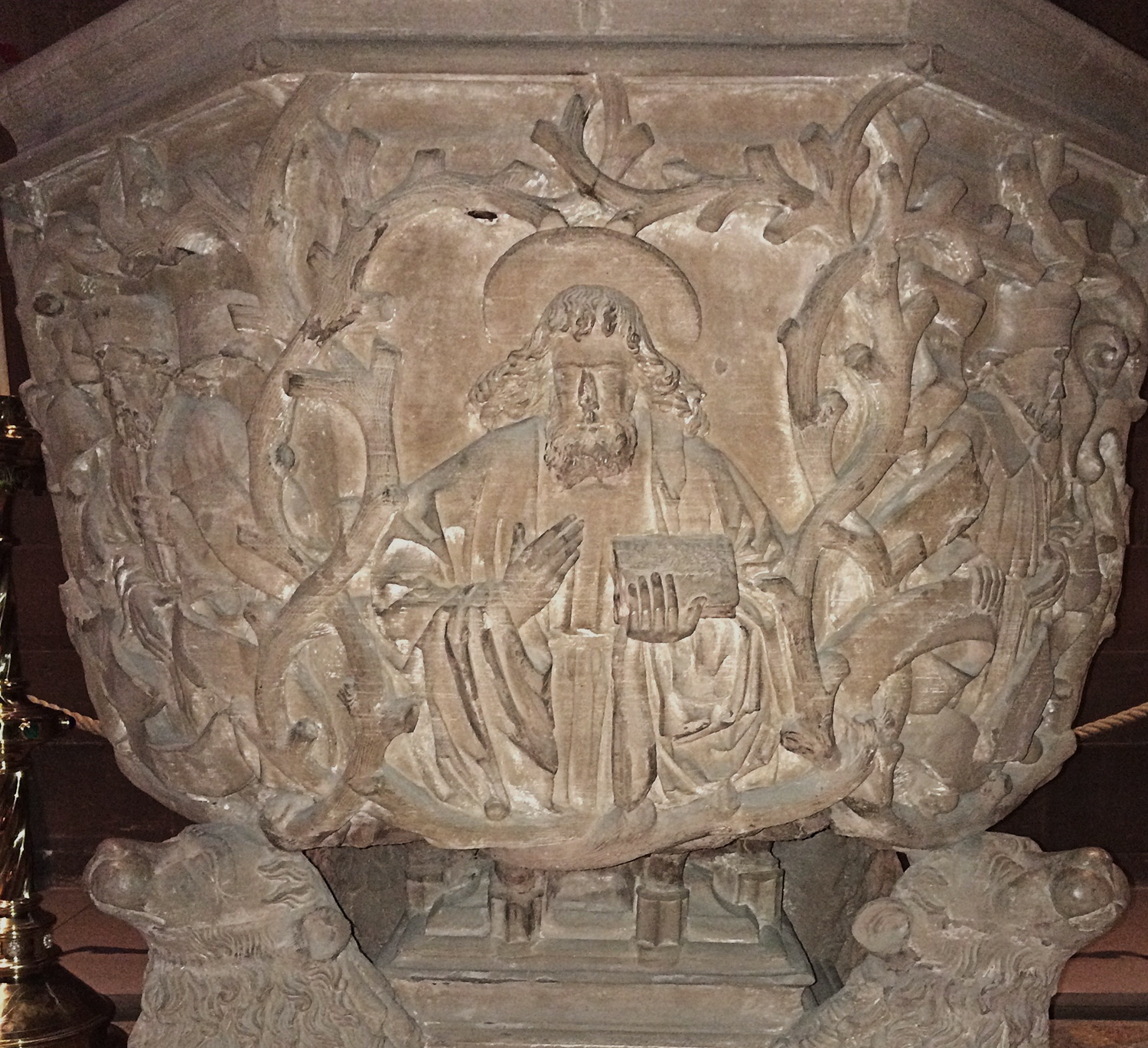 Schauseite mit Johannes dem Täufer.